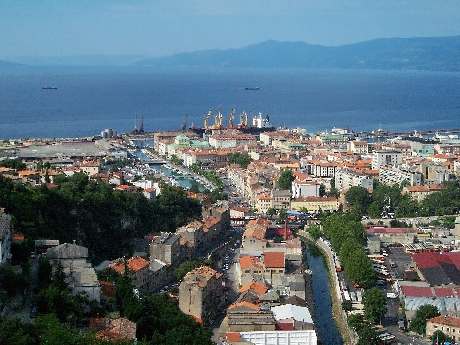 Rijeka (Croatia) Italian and Hungarian name: Fiume